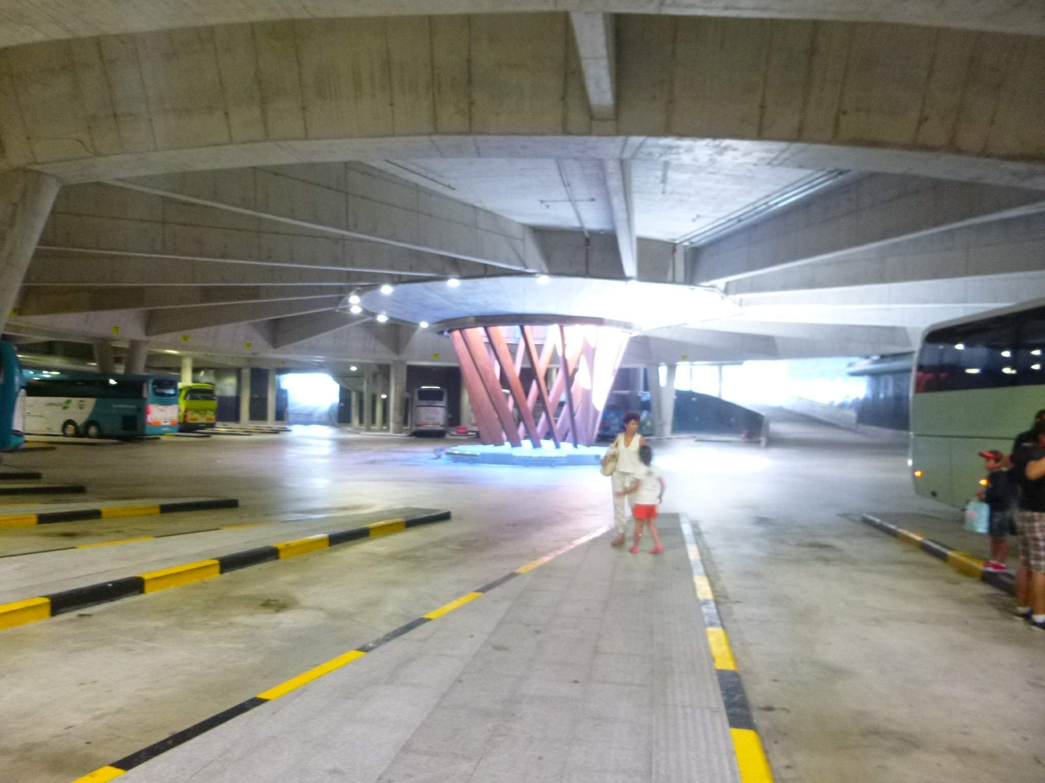 San Sebastián - Estación de Autobuses